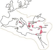 Kristendommens tidlige spredning. Områder med kristne menigheder omkring år 100